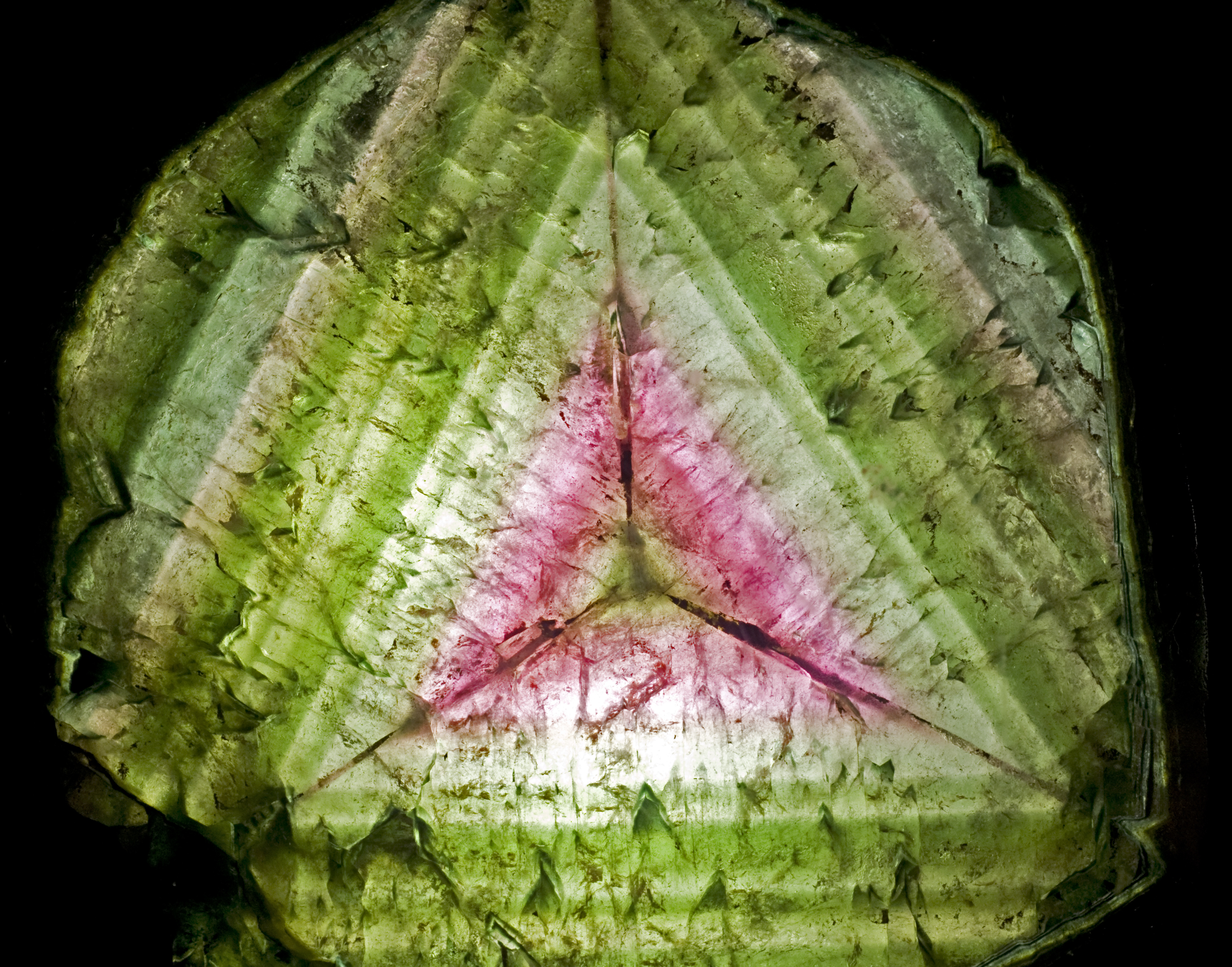 Mineraliensammlung des Naturmuseums Senckenberg Elbait (Turmalin)